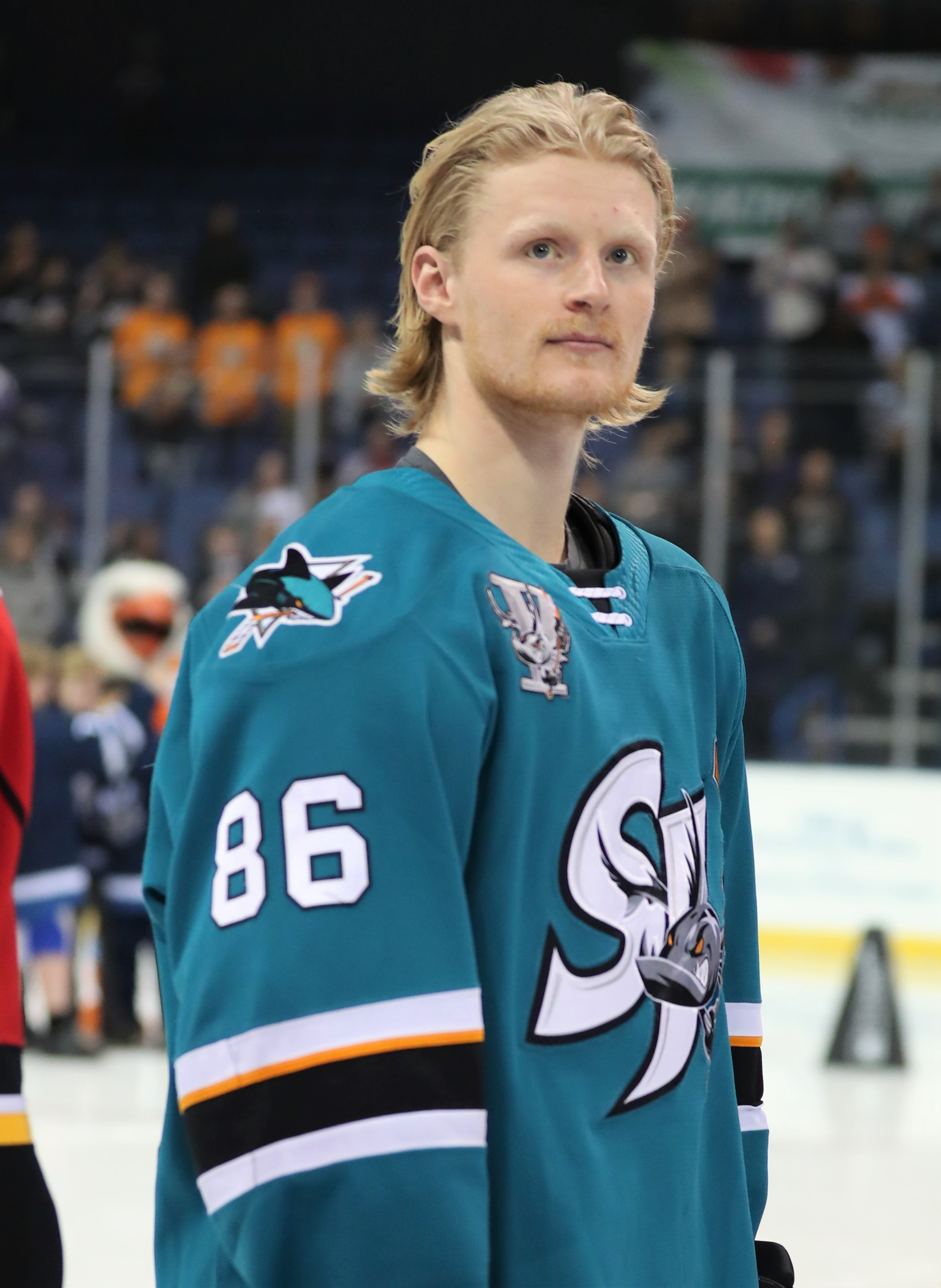 AA3I0933